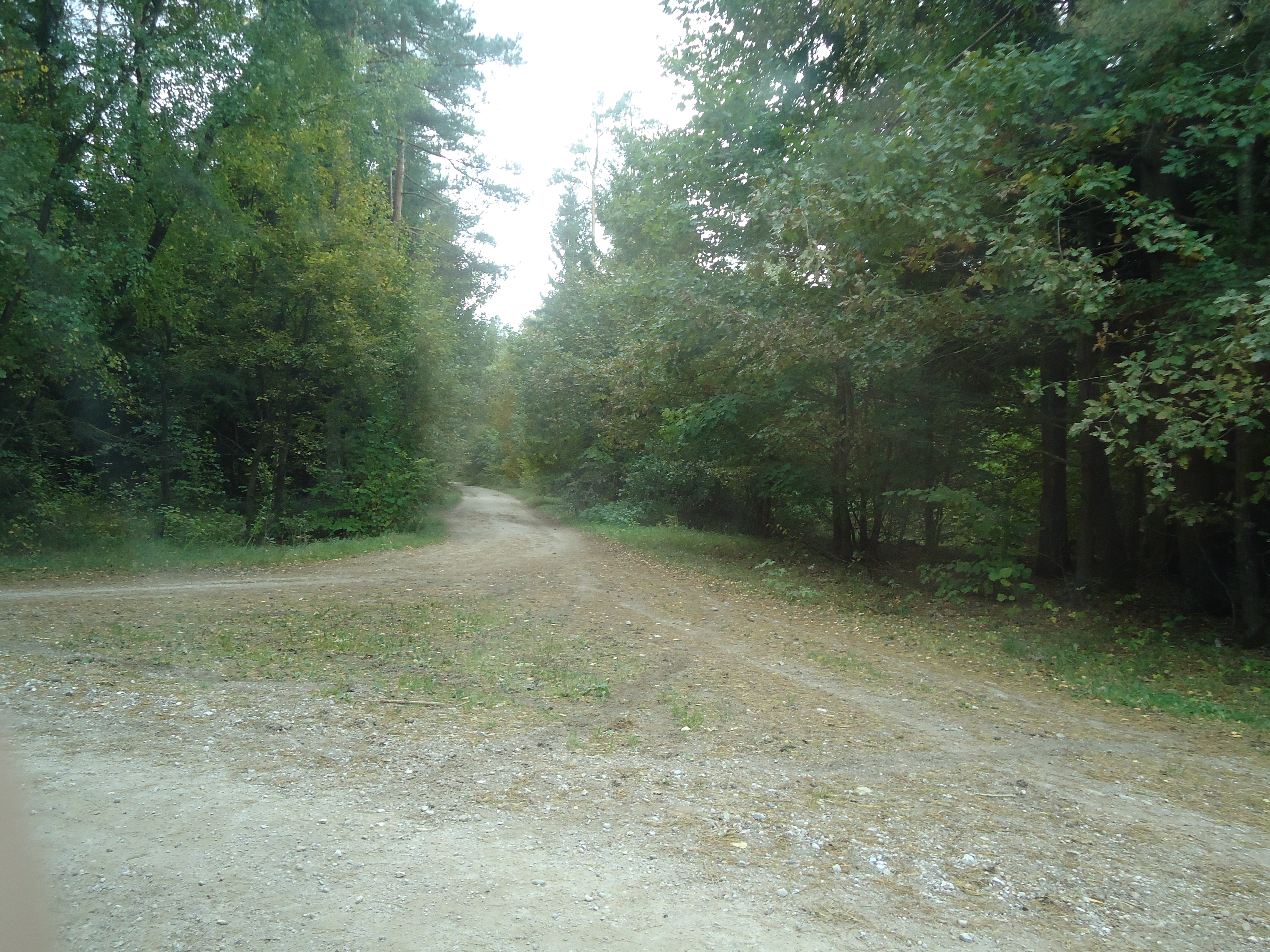 Padubysio miškas išvažiavimas iš Palazduonio kaimo